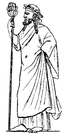 picture